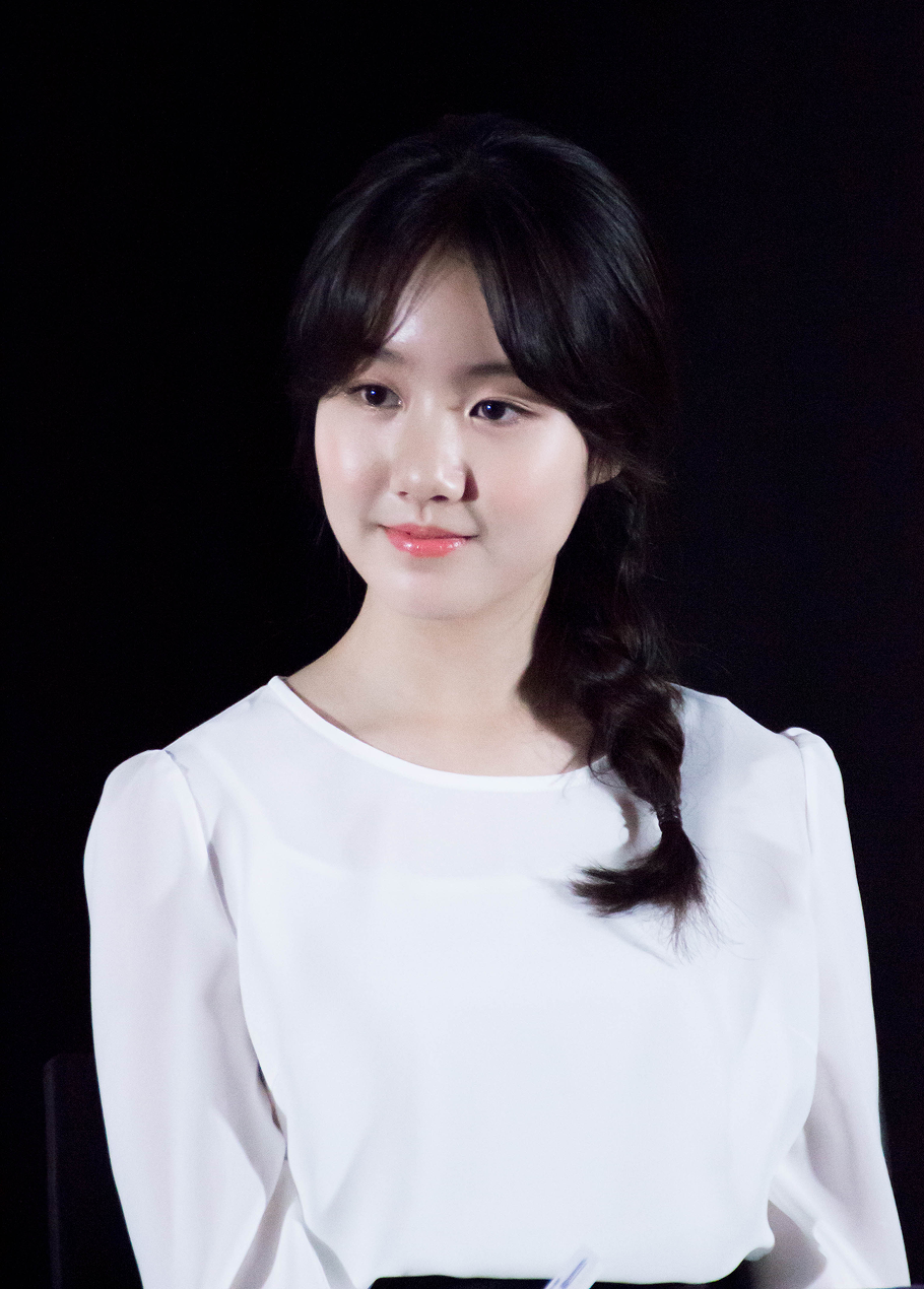 160804 국가대표2 무비토크 진지희